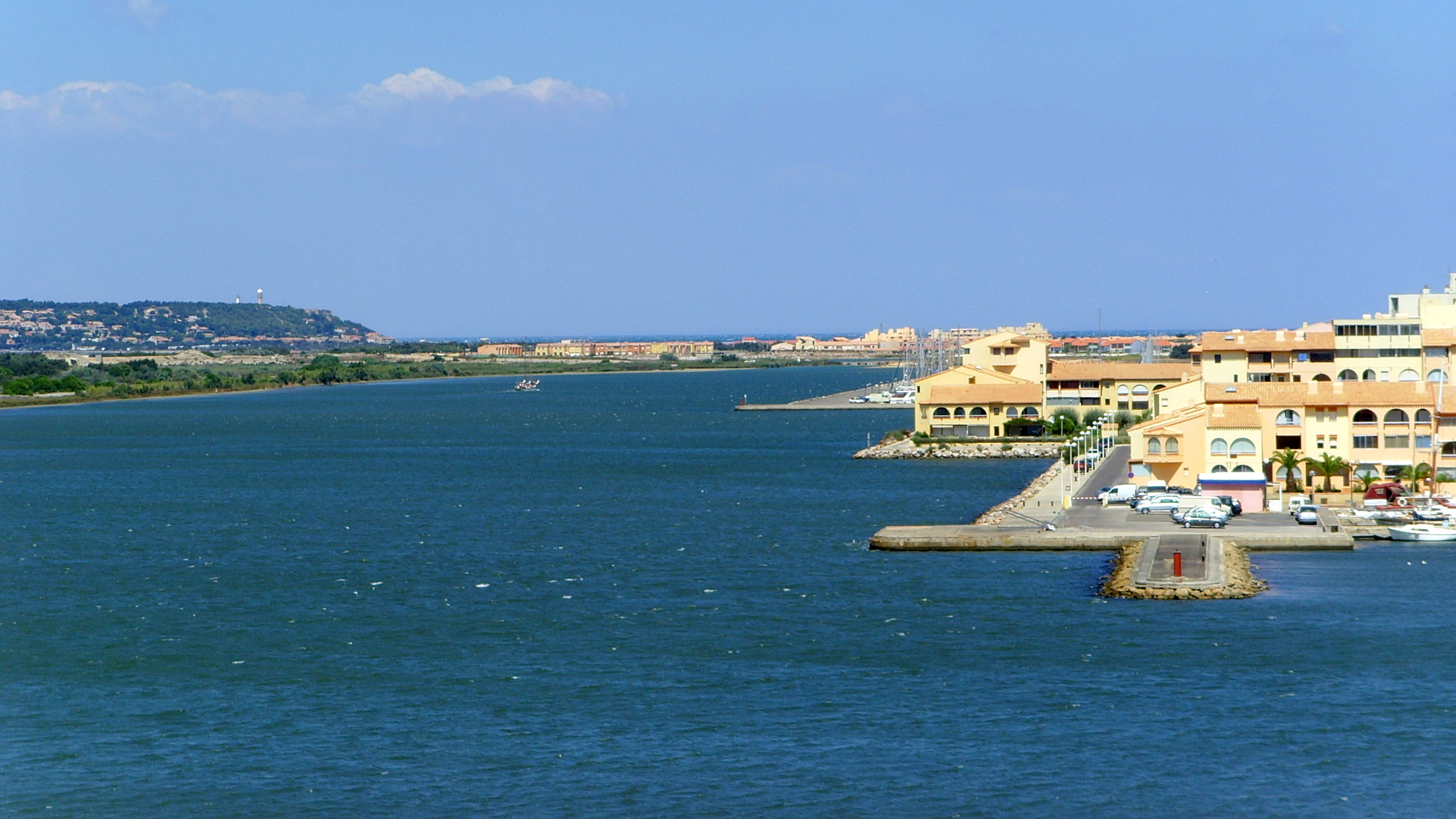 Leucate, Aude, France: Port Leucate photographer: Gerbil, summer 2006